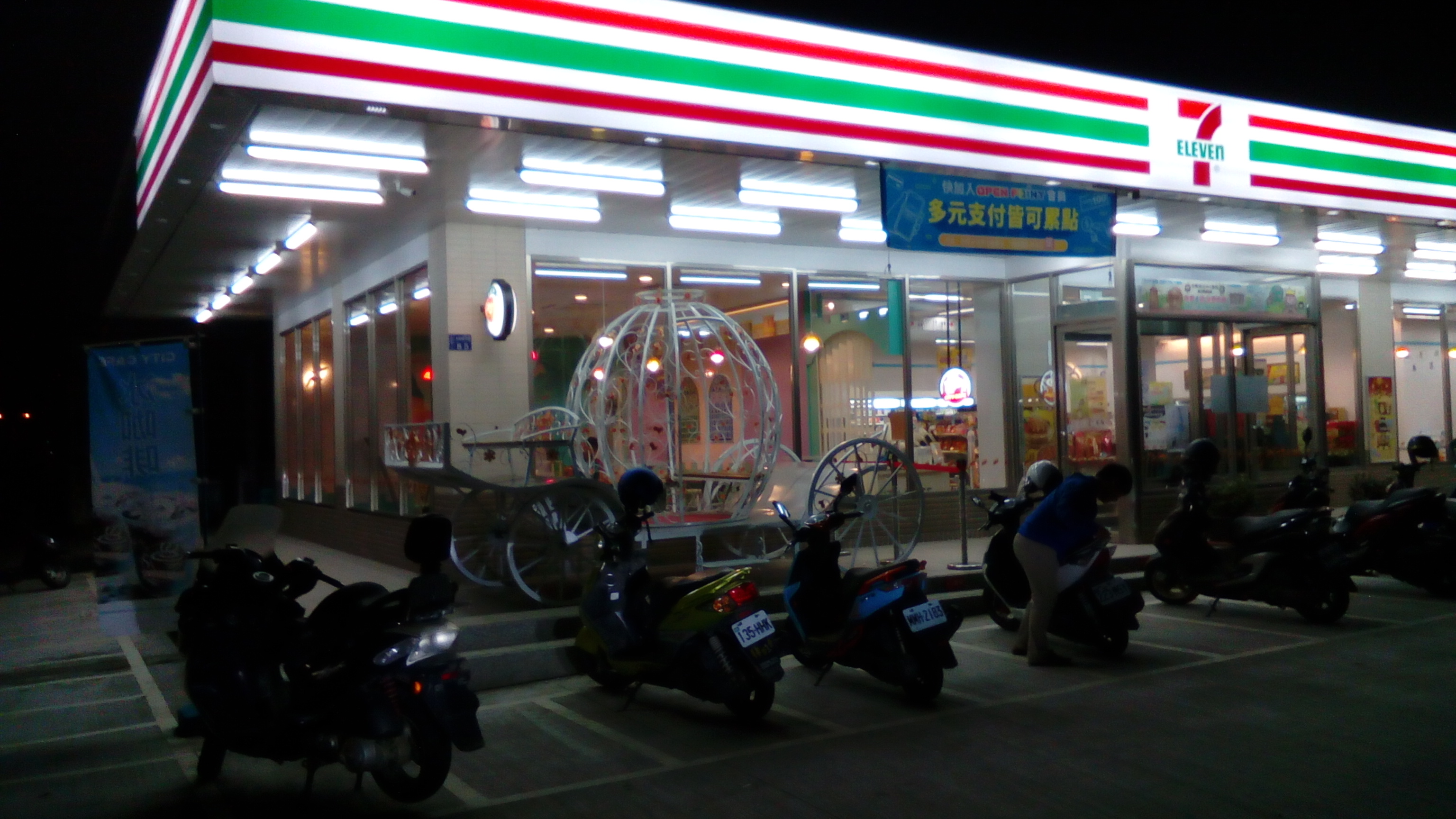 台3線屏東縣九如鄉南下路段，統一超商多多利門市夜景，地址：屏東縣九如鄉九如路三段85號。大門左側設置牛車裝置藝術，牛車在當地象徵嫁妝。